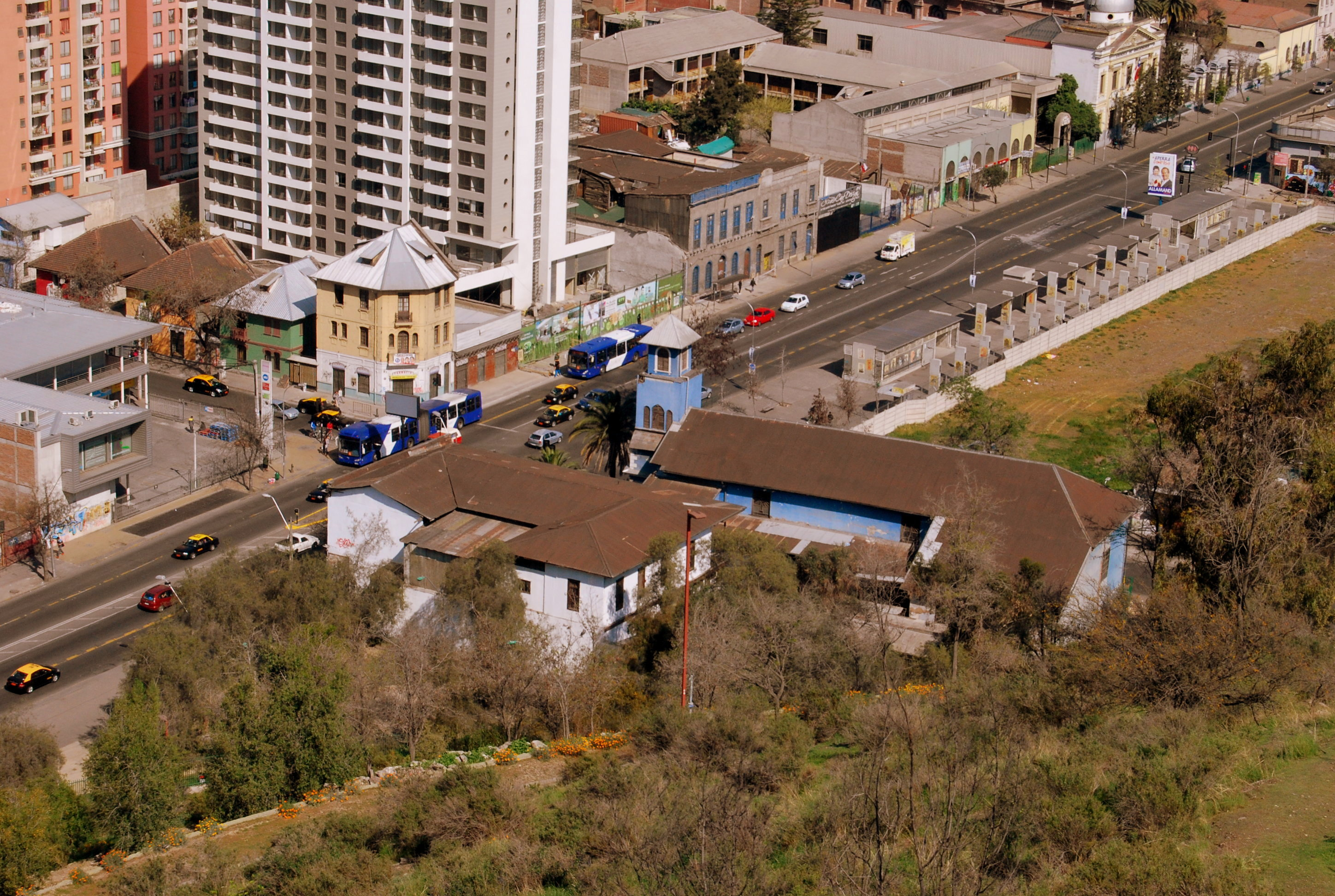 Iglesia La Viñita This is a photo of a national monument in Chile: 877